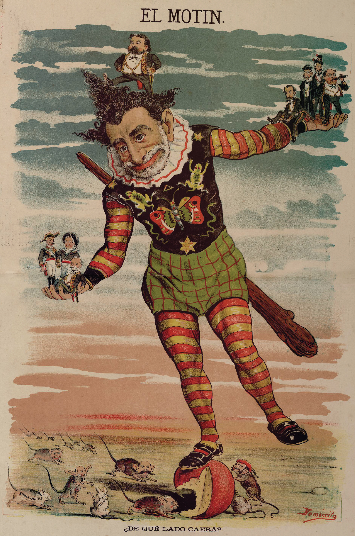 ¿De qué lado caerá?, de Eduardo Sojo «Demócrito», caricatura publicada en la revista satírica española El Motín. Representa el primer gobierno tras la Restauración borbónica de Práxedes Mateo Sagasta, quien sostiene entre sus manos a varios miembros de su gabinete ministerial. También aparecen integrantes de otras fuerzas políticas de la oposición caracterizados en forma de ratones.